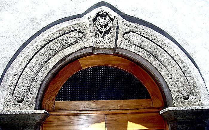 Particolare dell'arco che sovrasta il portone di un edificio del centro storico di Castell'Azzara (GR), Tuscany (Italy)